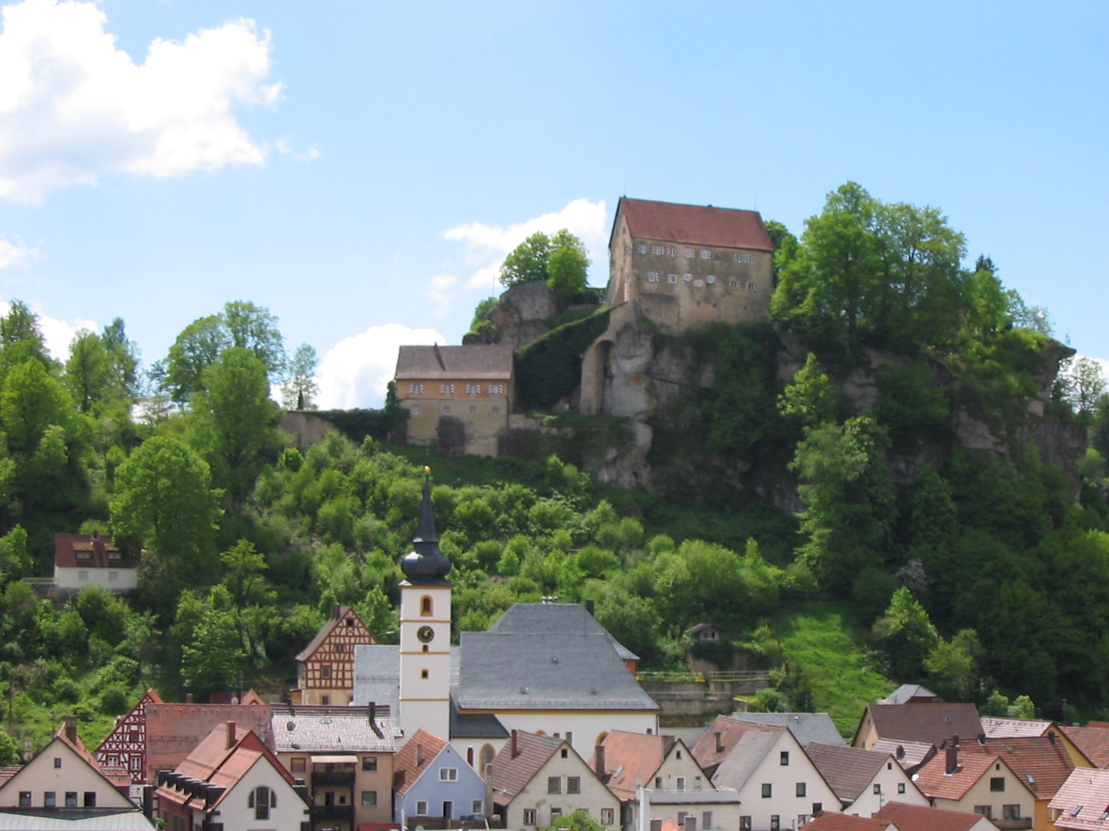 Blick auf die Burg Pottenstein.